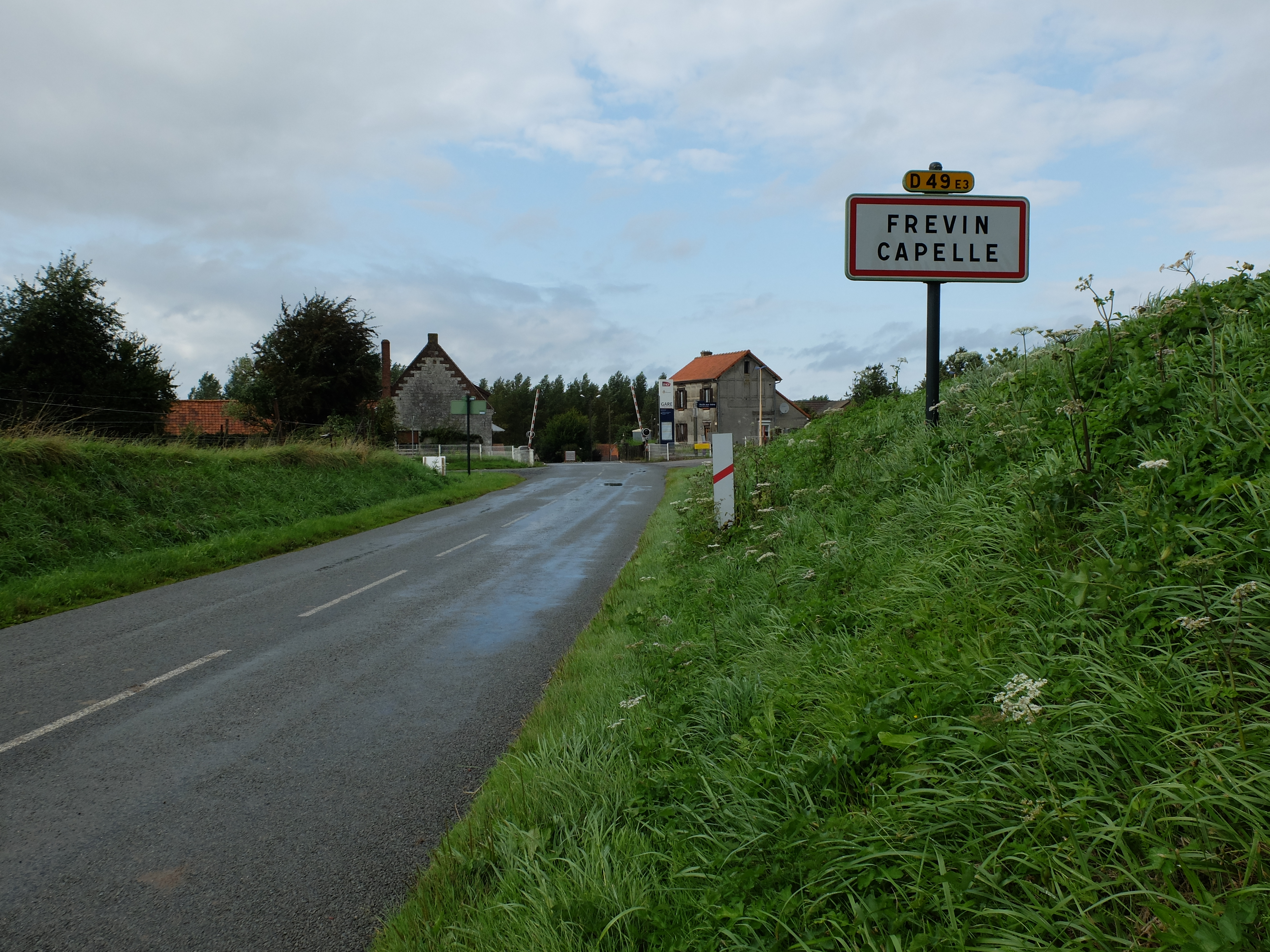 Vue d'une entrée de la commune de Frévin-Capelle. Au fond se situe la gare.